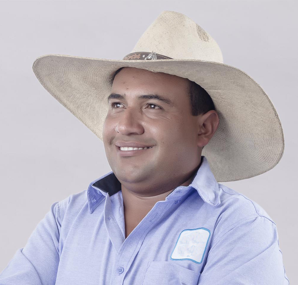 Alcalde